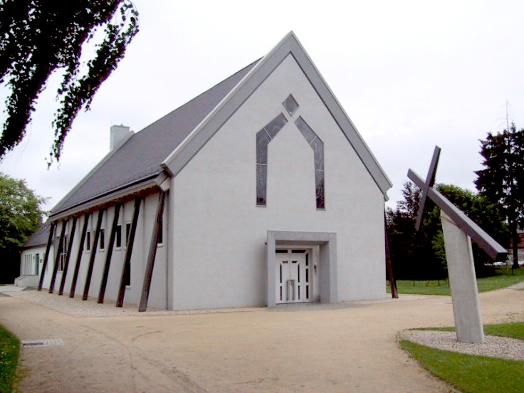 St. Hedwig Görlitz-West Fotograf: Methusalem